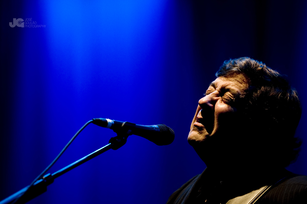 Rui Veloso Esta é no concerto de Mariza, no Pavilhão Atlântico